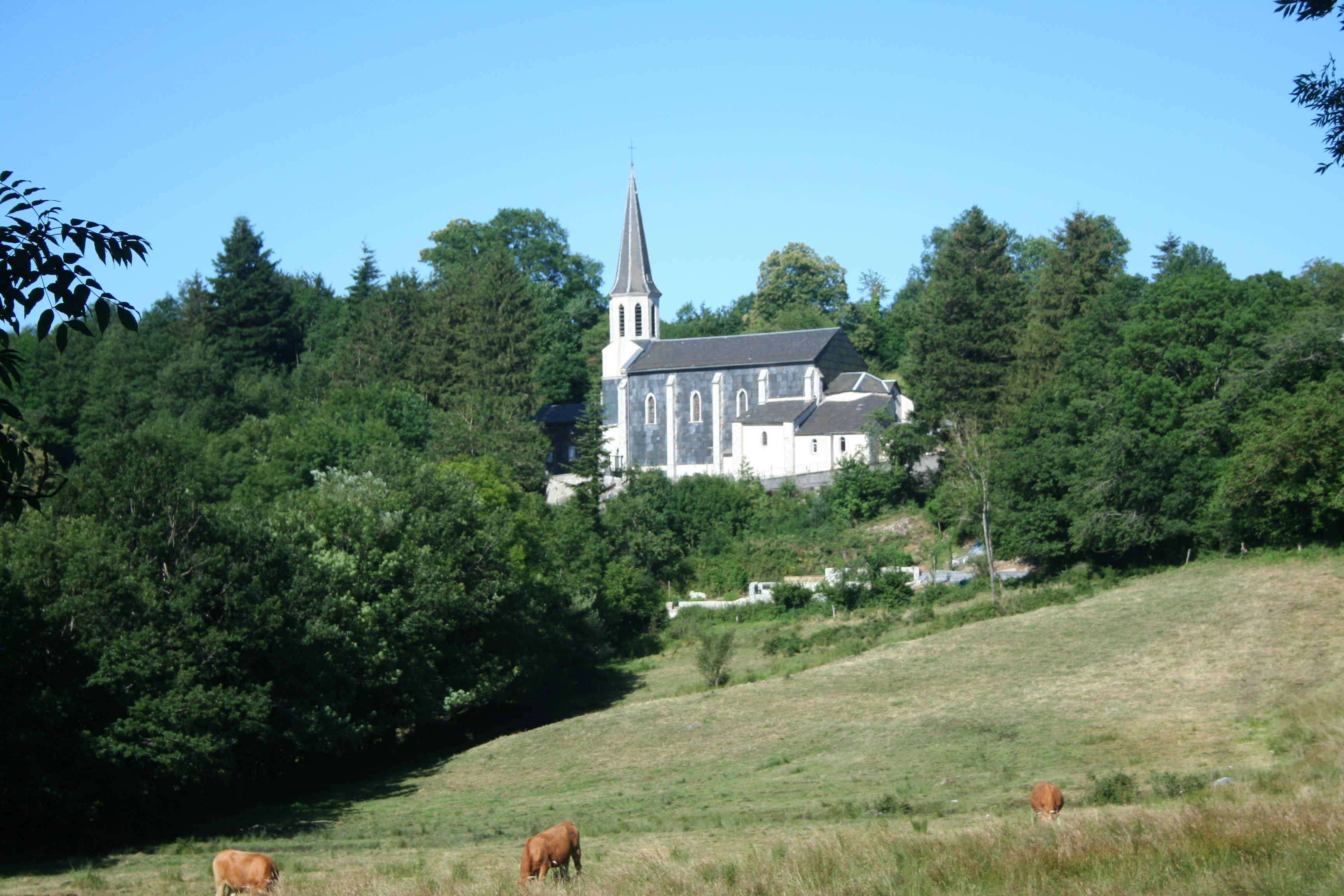 Lamontélarié (Tarn) - vue générale et église Notre-Dame.